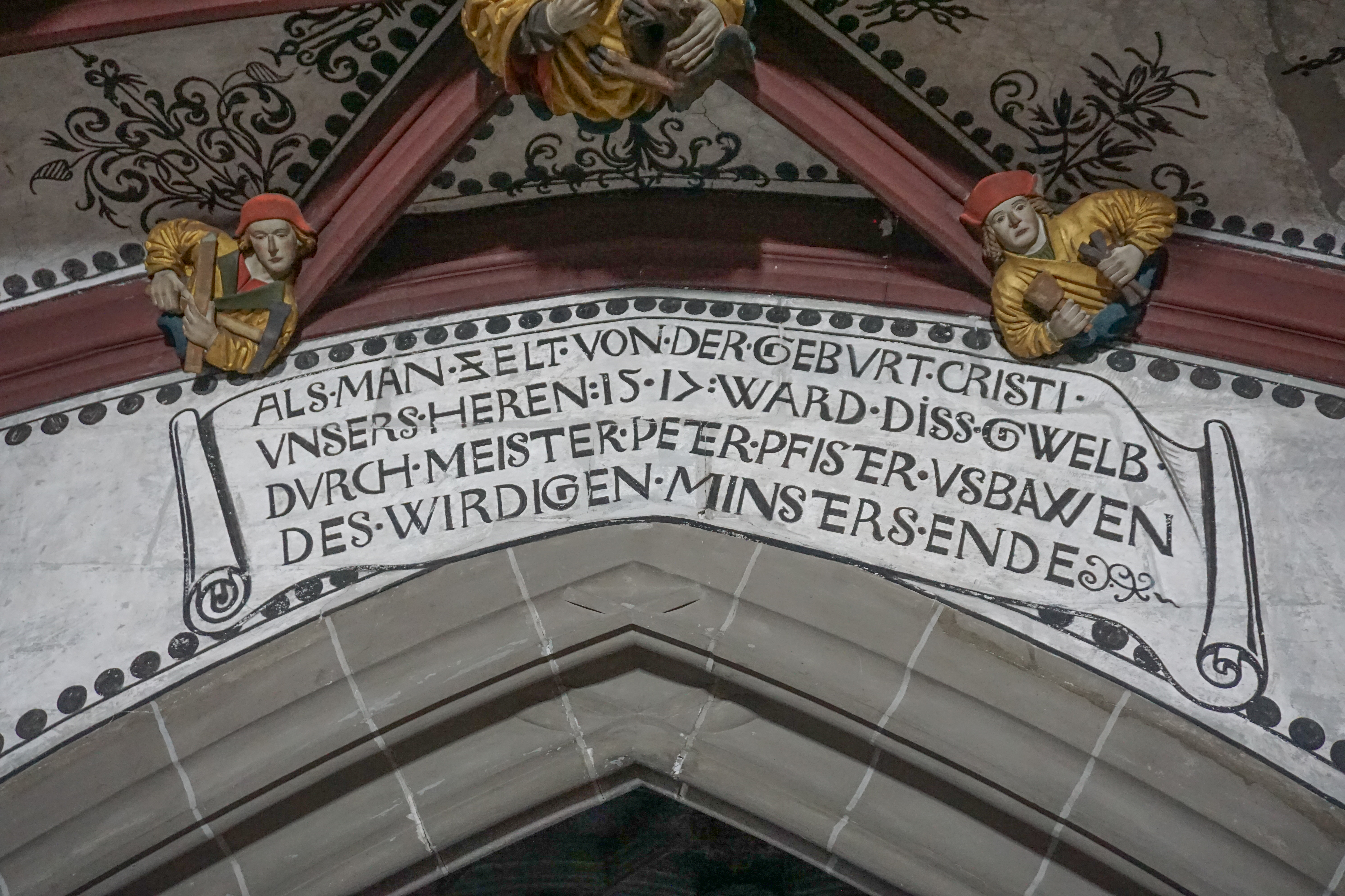 Schriftband am Chorbogen mit Nachweis des Baumeisters und Jahrzahl 1517